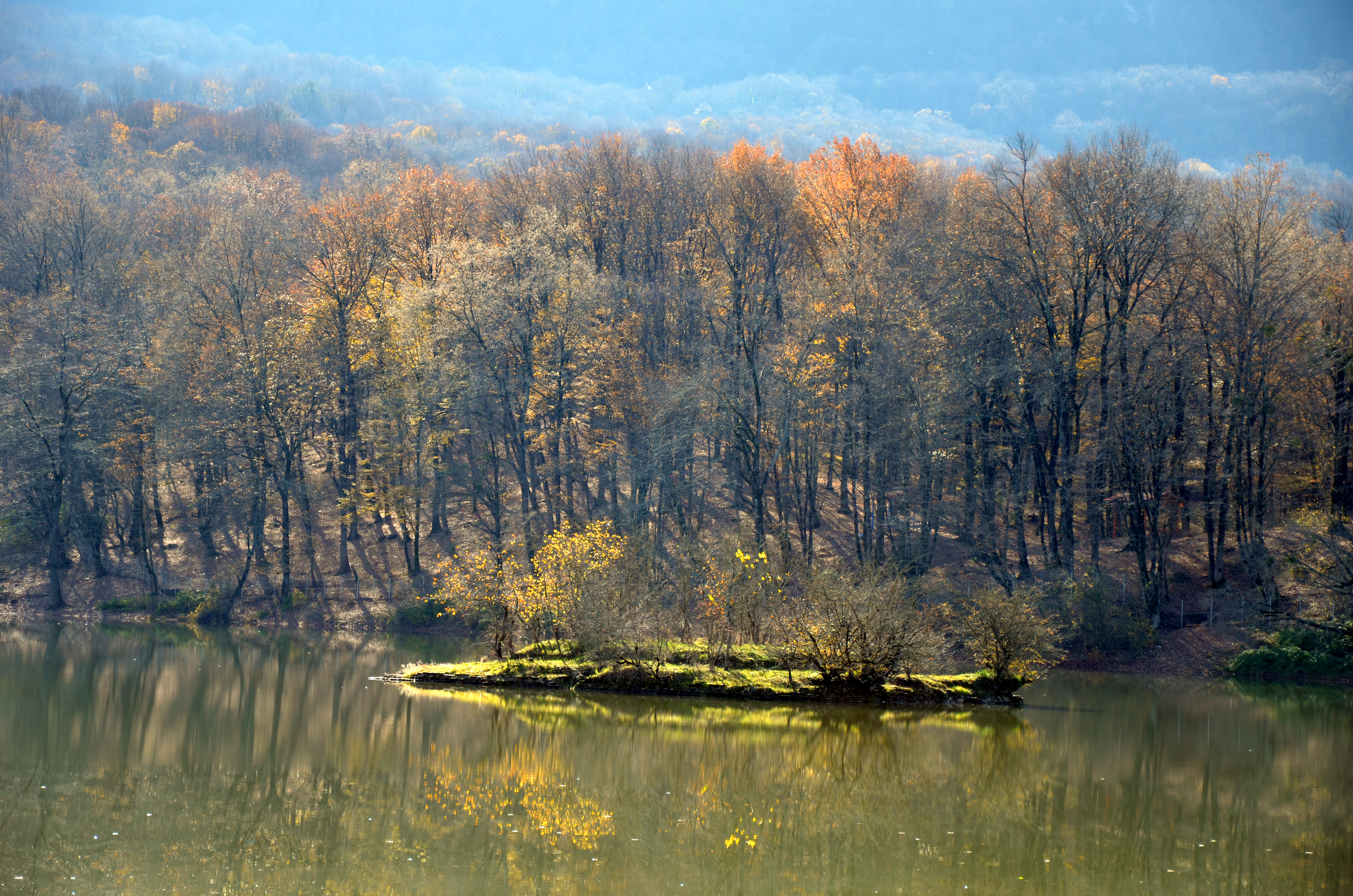 Mazandaran - Behshahr - Abbasabad Lake